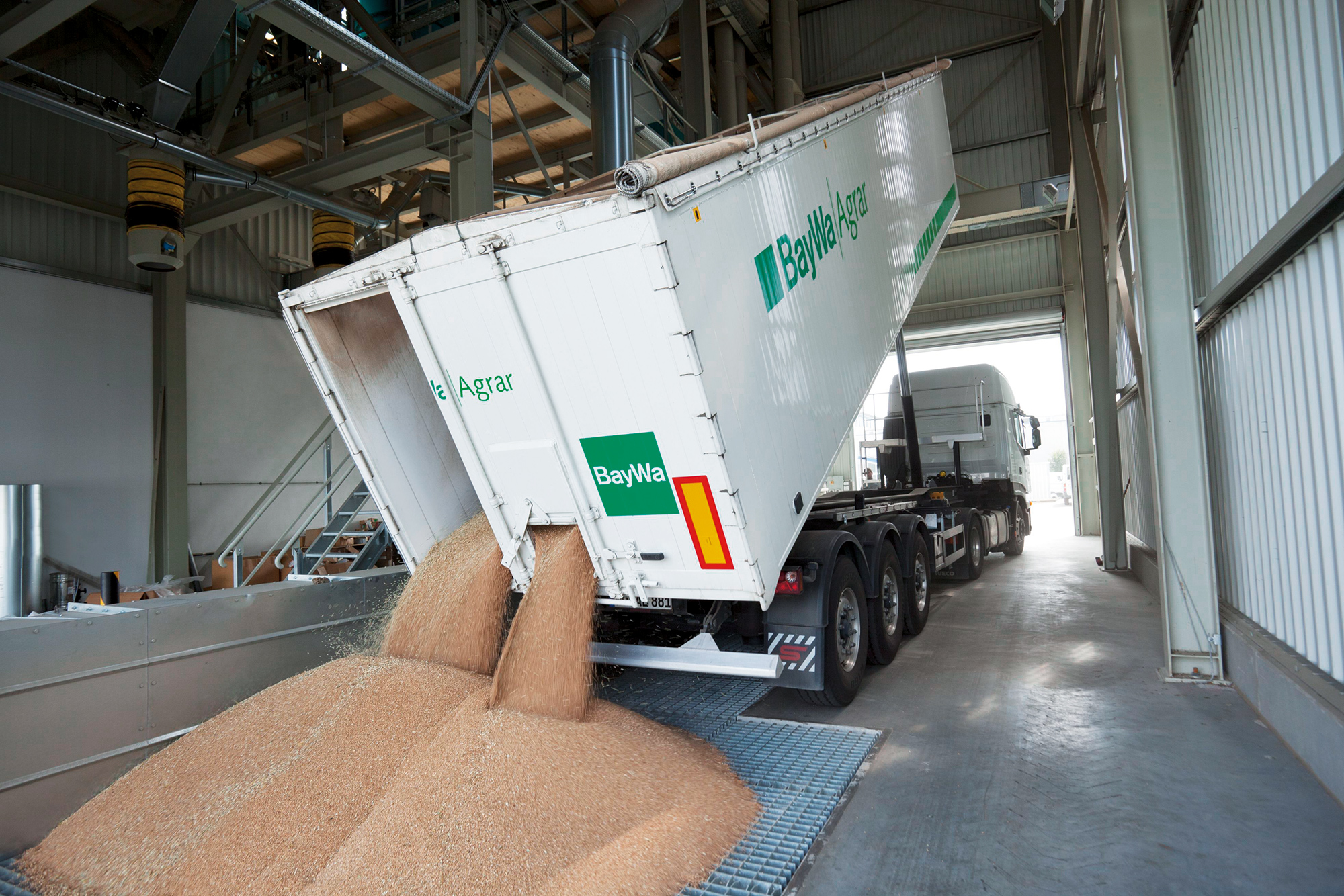 Getreidelieferung mit einem LKW der BayWa AG